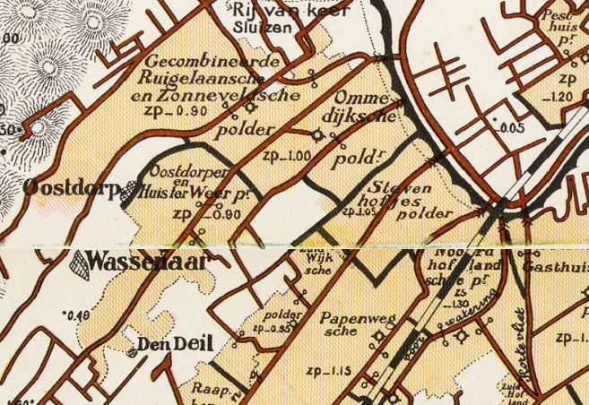 Ommedijksepolder , Stevenhofjespolder